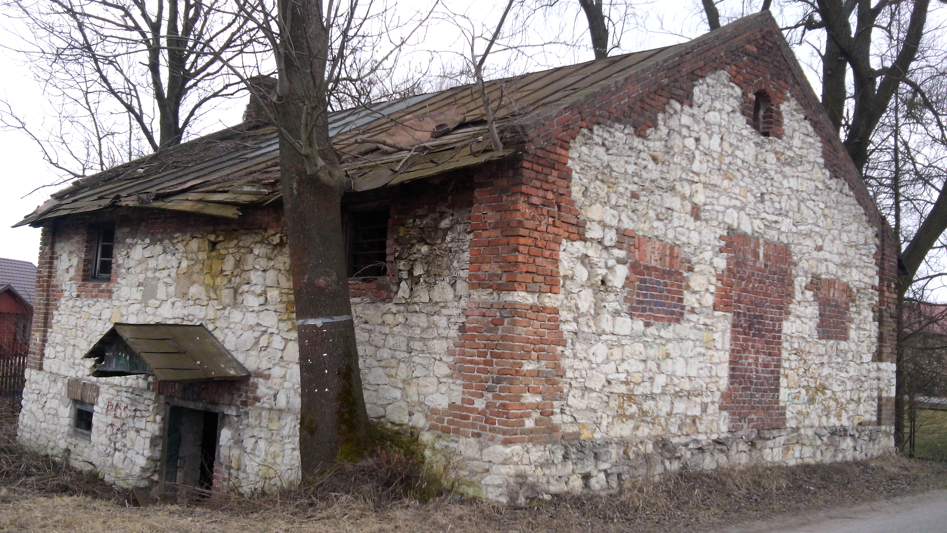 Młyn wodny w Zawadówce (gmina Chełm)